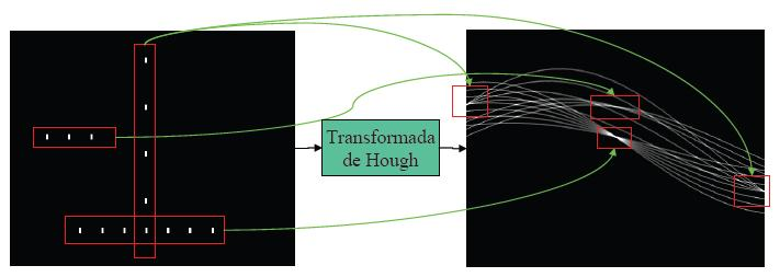 th punts